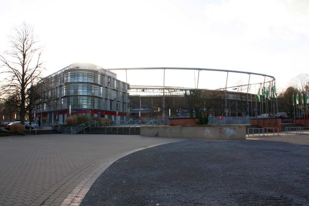 AWD Arena Hannover